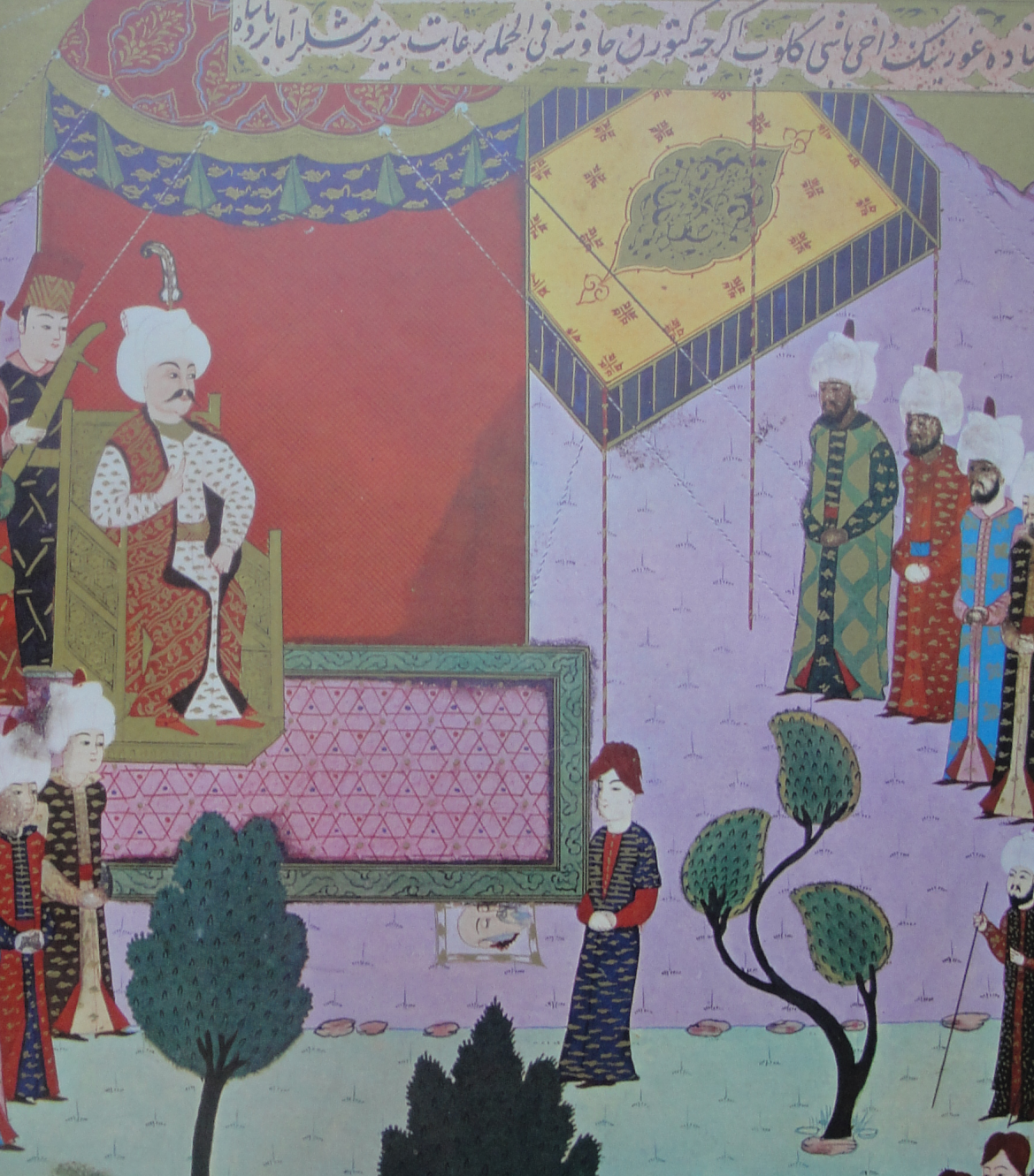 Yavuz Sultan Selim'e Kansu-Gavri'nin kesik basinin getirilmesi. Hunername I, fol.211 a